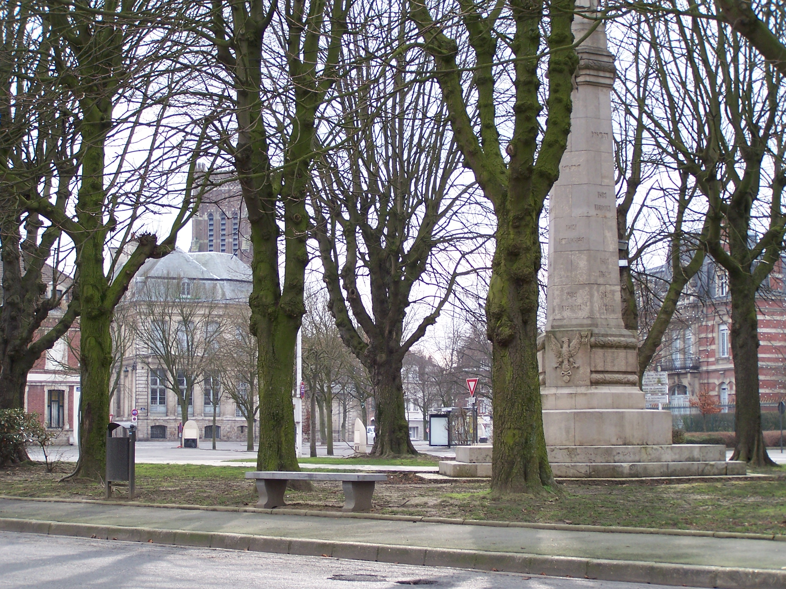 auteur : Yannick Bernard